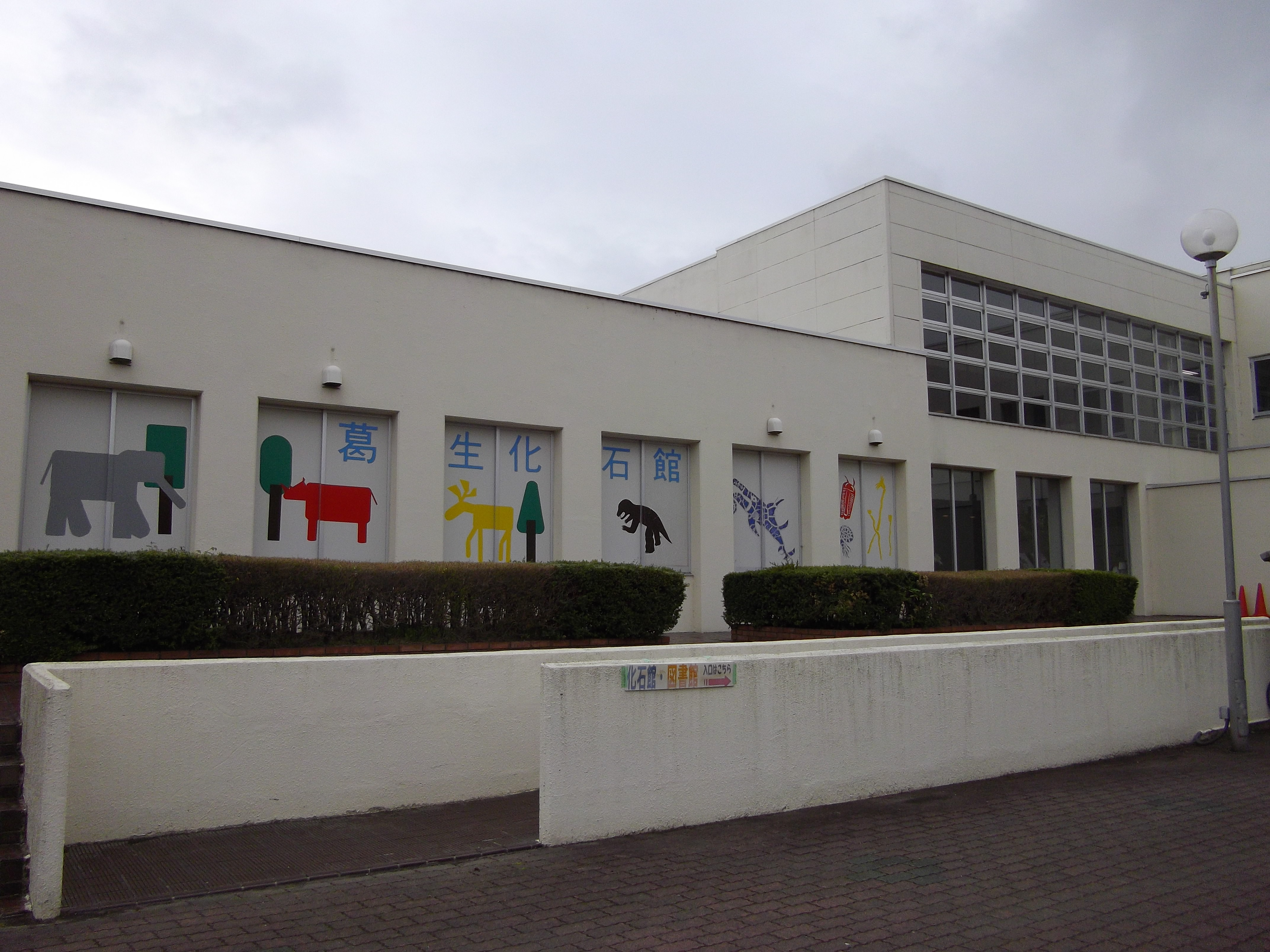 葛生化石館建物外観 栃木県佐野市葛生東1丁目11-10 2012年4月22日撮影